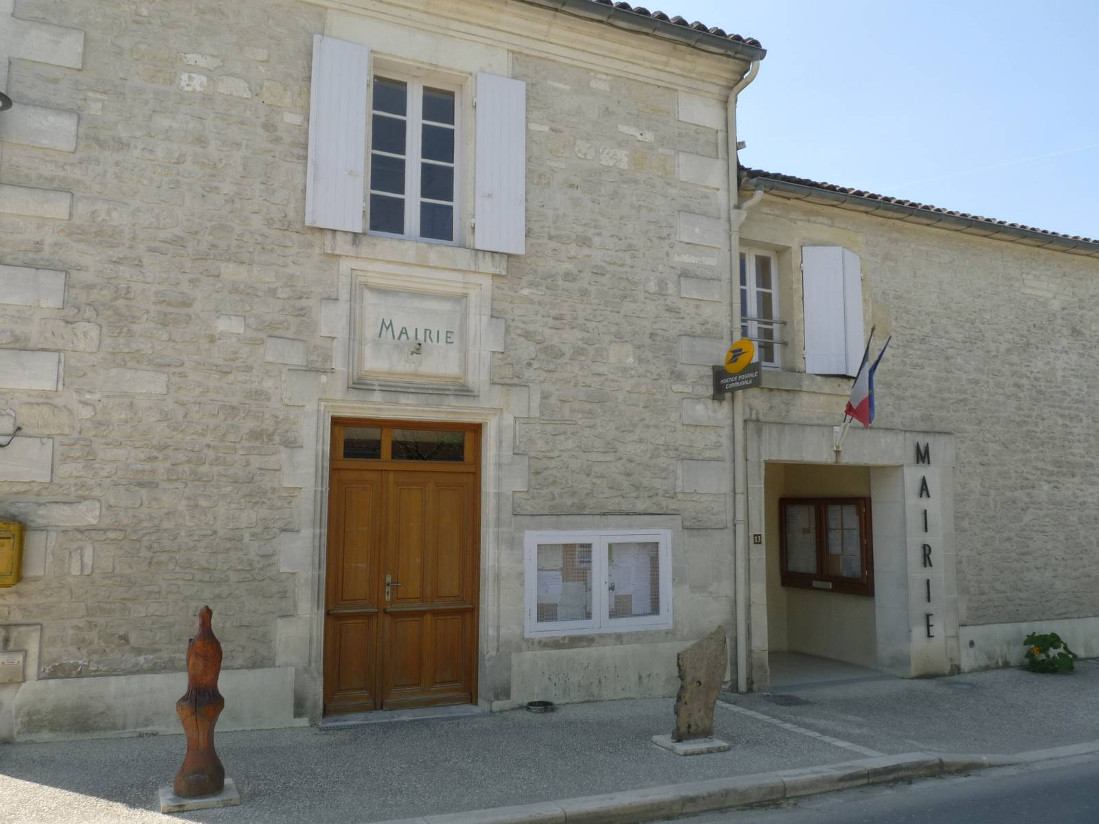 Mairie de Bréville, Charente, France